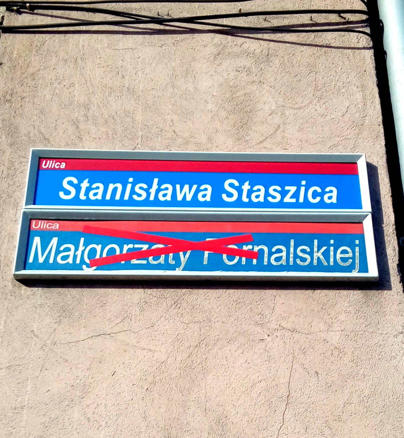 Rada Miasta Kamiennej Góry po konsultacjach z mieszkańcami zadecydowała o zmianie nazw 5 ulic w mieście. Procedurę wymusiły przepisy tzw. ustawy dekomunizacyjnej. Kierując się wytycznymi Instytutu Pamięci Narodowej wytypowano do przemianowania patronów ulic: Małgorzaty Fornalskiej, Hanki Sawickiej, E. i J. Rosenbergów, Armii Ludowej i Janka Krasickiego. Obecnie ich nazwy to: Stanisława Staszica, Żytnia, Licealna, gen. Józefa Hallera i Mikołaja Reja.